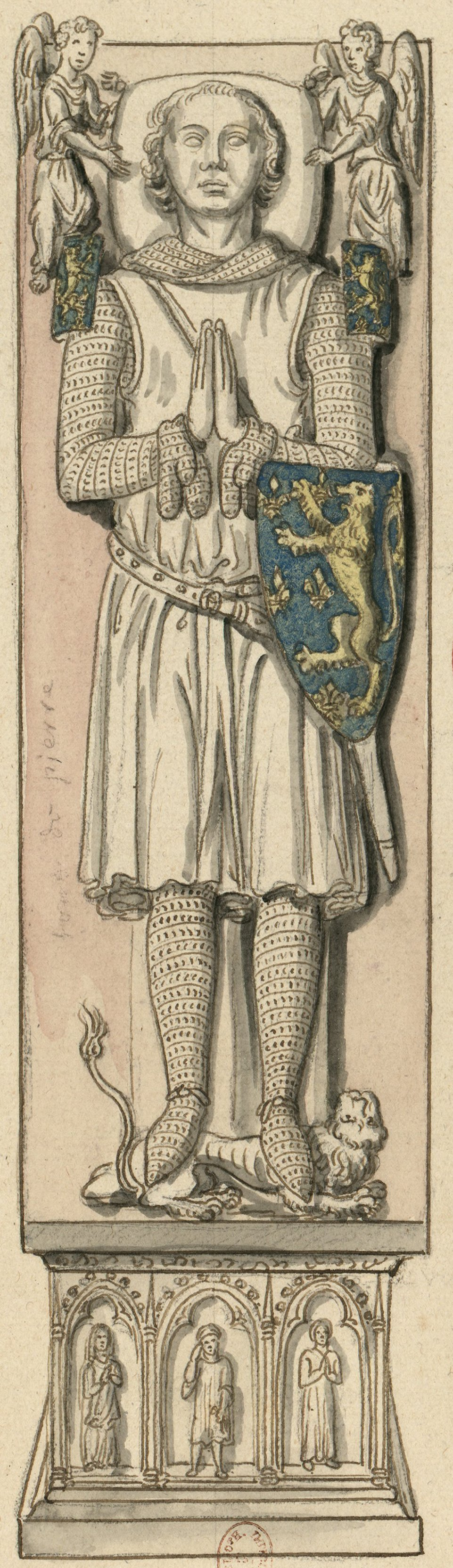 Jean de Beaumont, fils de Louis et d'Agnez